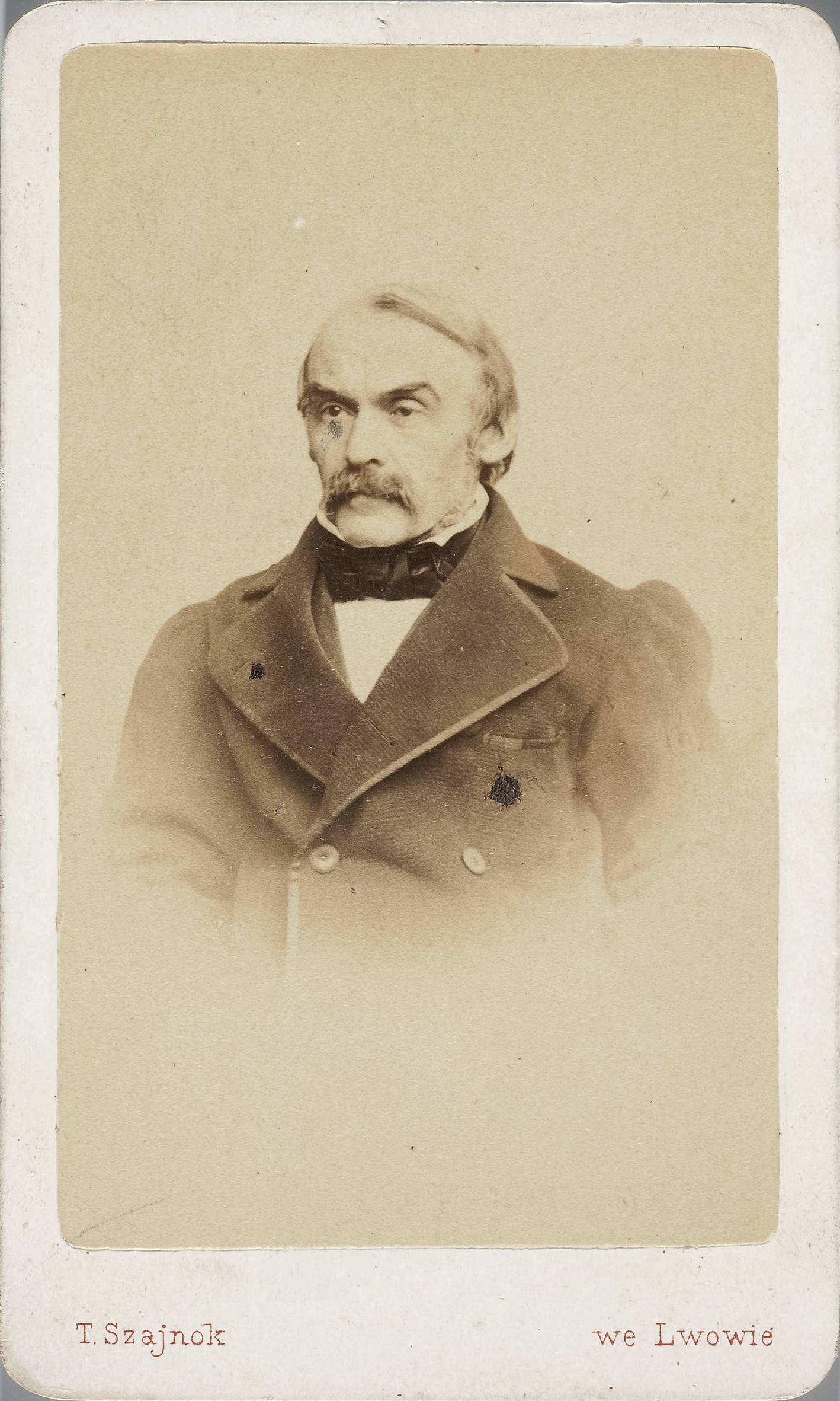 Karol Szajnocha (1818–1868), Polish historian. Owner: National Museum, Warsaw